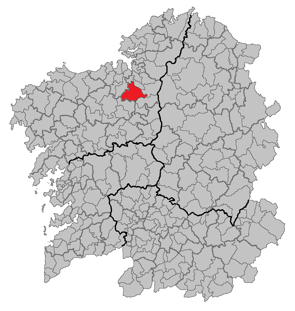 Mapa coa localización do concello de Oza-Cesuras.